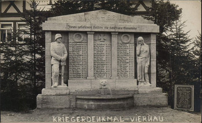 Viernau/Thüringen: Kriegerdenkmal für die im Ersten Weltkrieg Gefallenen der Gemeinde. Das Denkmal ist erhalten und steht an der Hauptstraße in Richtung Schmalkalden.